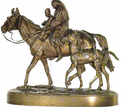 Скульптура "Две матреи". Лансере Е.А. Модель 1884 года. Россия, СПб. Отливка фабрики художественной бронзы Ф.Ю. Шопена. Литейщик А.Моран